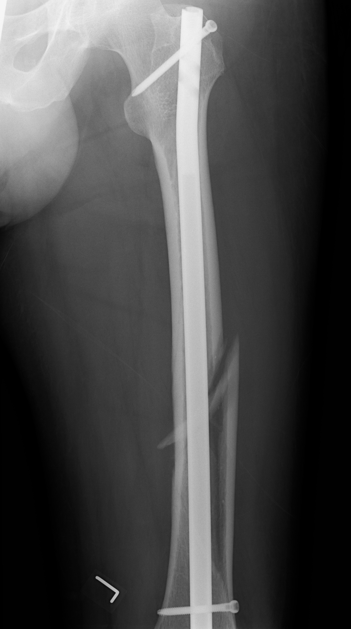 צילום רנטגן המראה שבר ספירלי בעצם הירך מייד לאחר שטופל ע"י קיבוע במסמר תוך לשדי